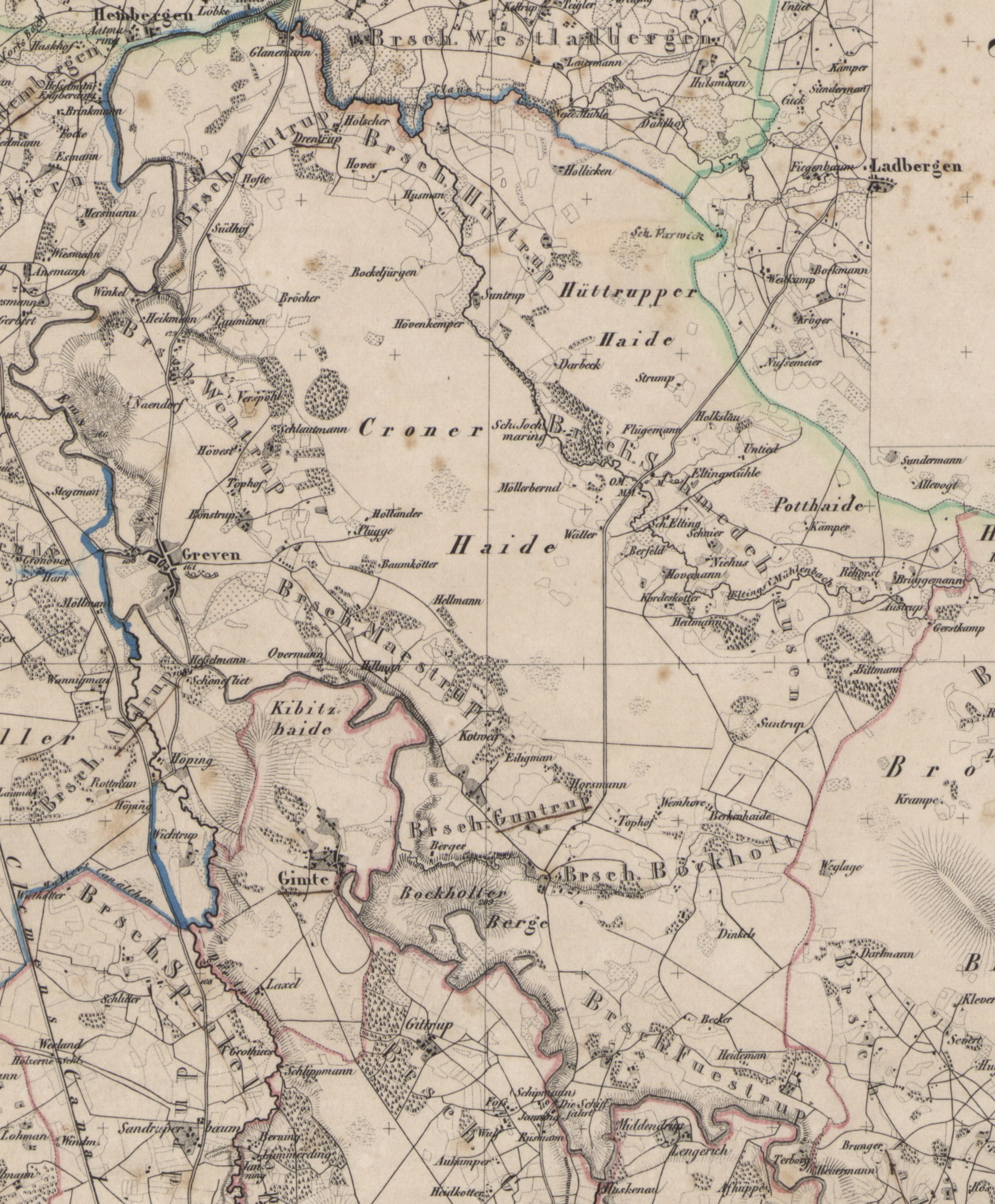 Location of Greven rechts der Ems